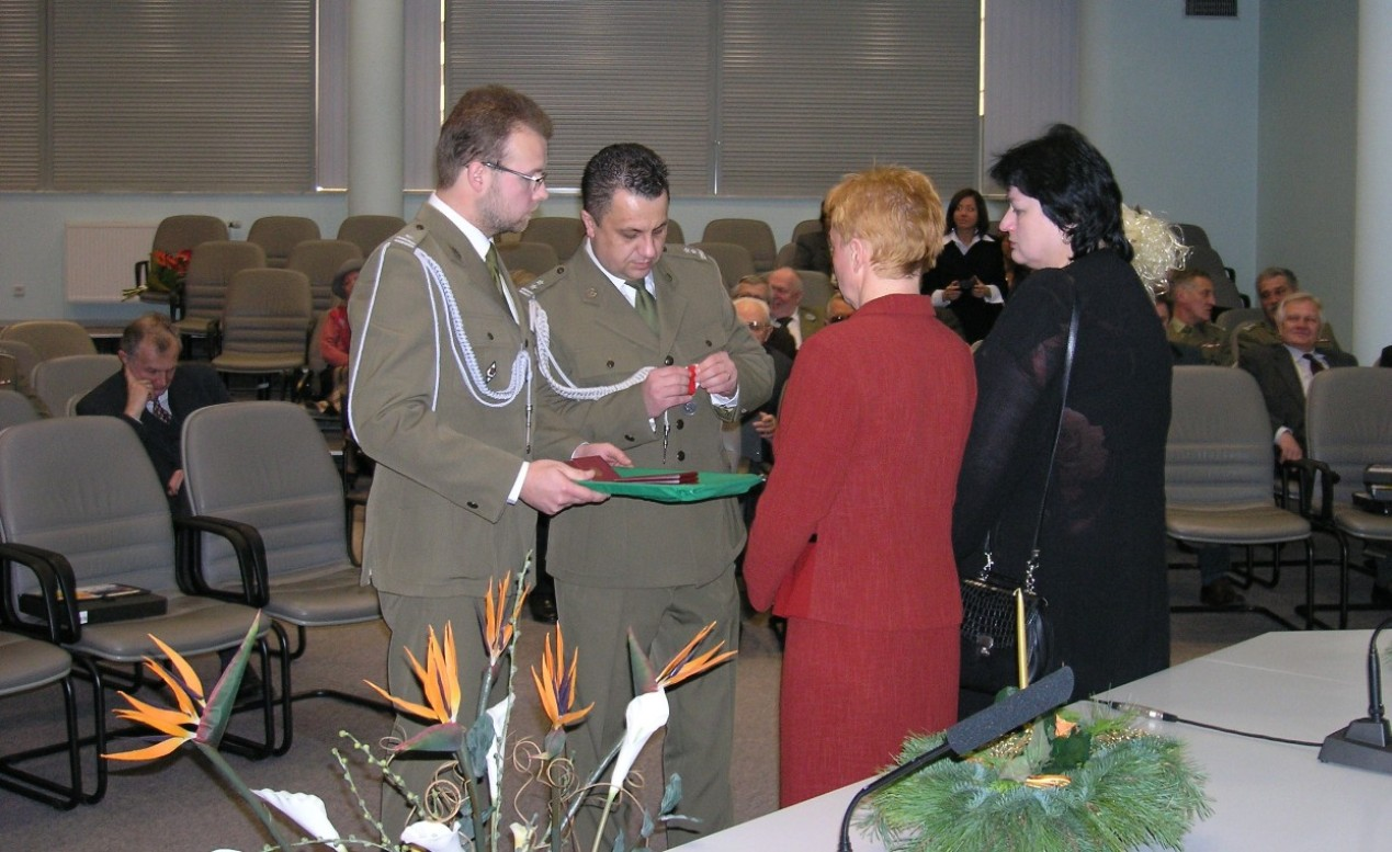 Szczecin, 2004r.Obchody 60-lecia 109 Szpitala Wojskowego